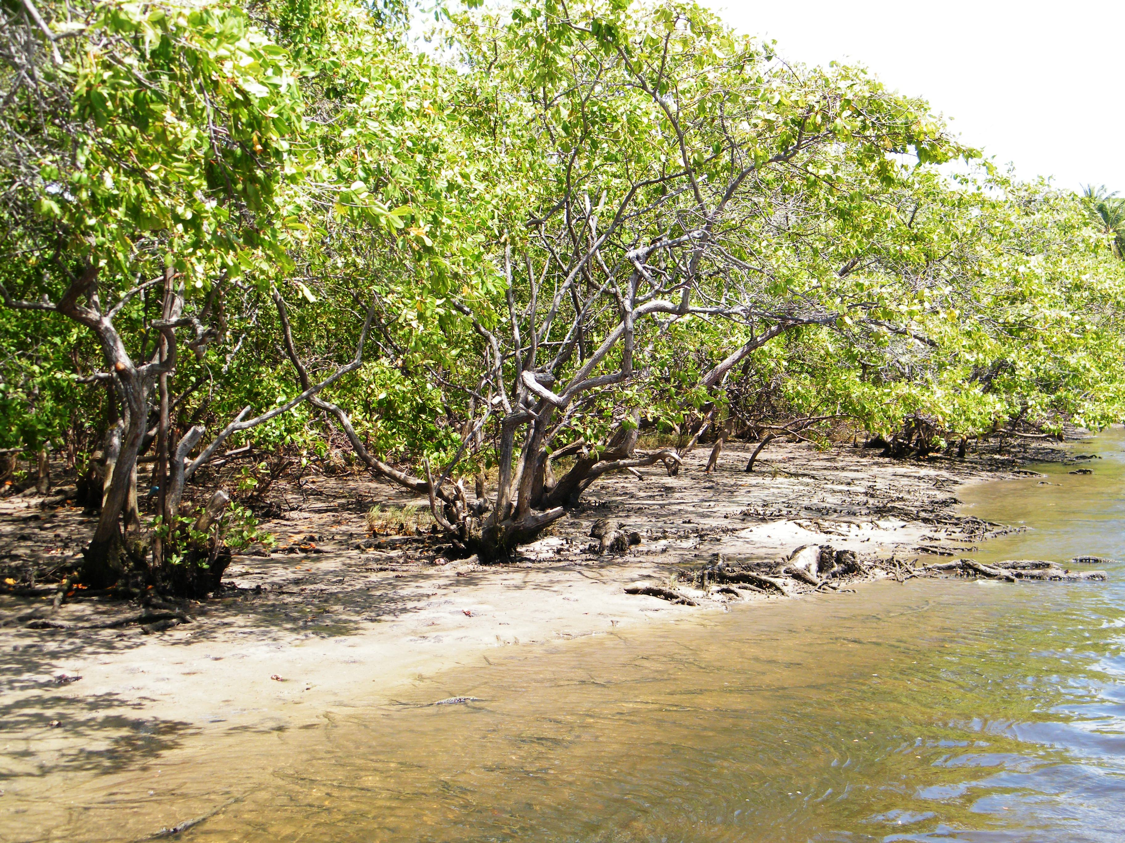 Vegetação dos manguezais em uma praia de Tibau do Sul - Rio Grande do Norte, Brasil.